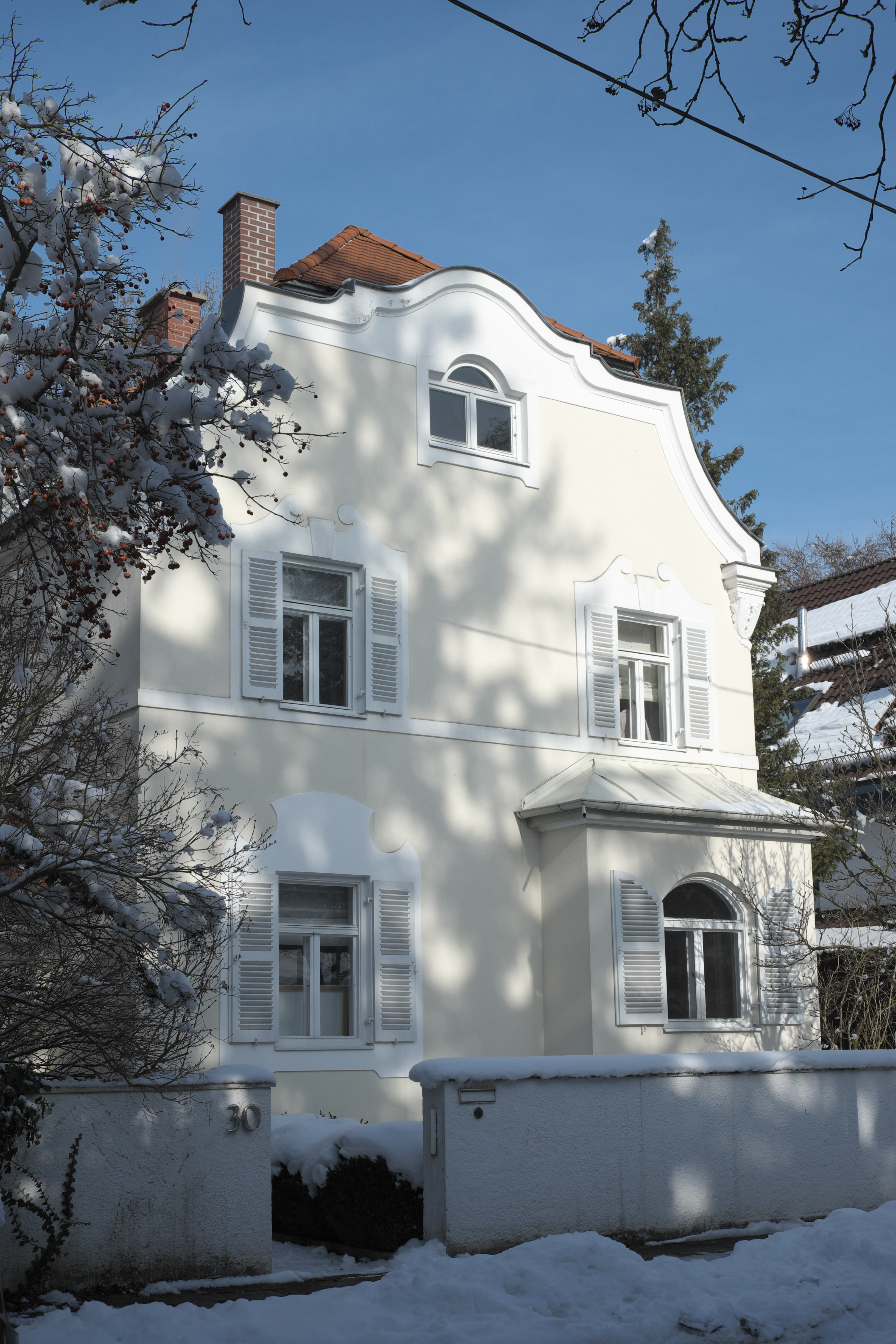 Villa, Hofmillerstraße 30, in Obermenzing im Stadtbezirk Pasing-Obermenzing in München (Bayern/Deutschland), um 1900 erbaut, wohl aus dem Büro August Exter